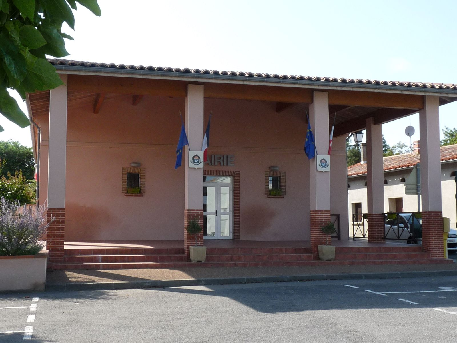 Mairie de Montgaillard-Lauragais, Haute-Garonne, France